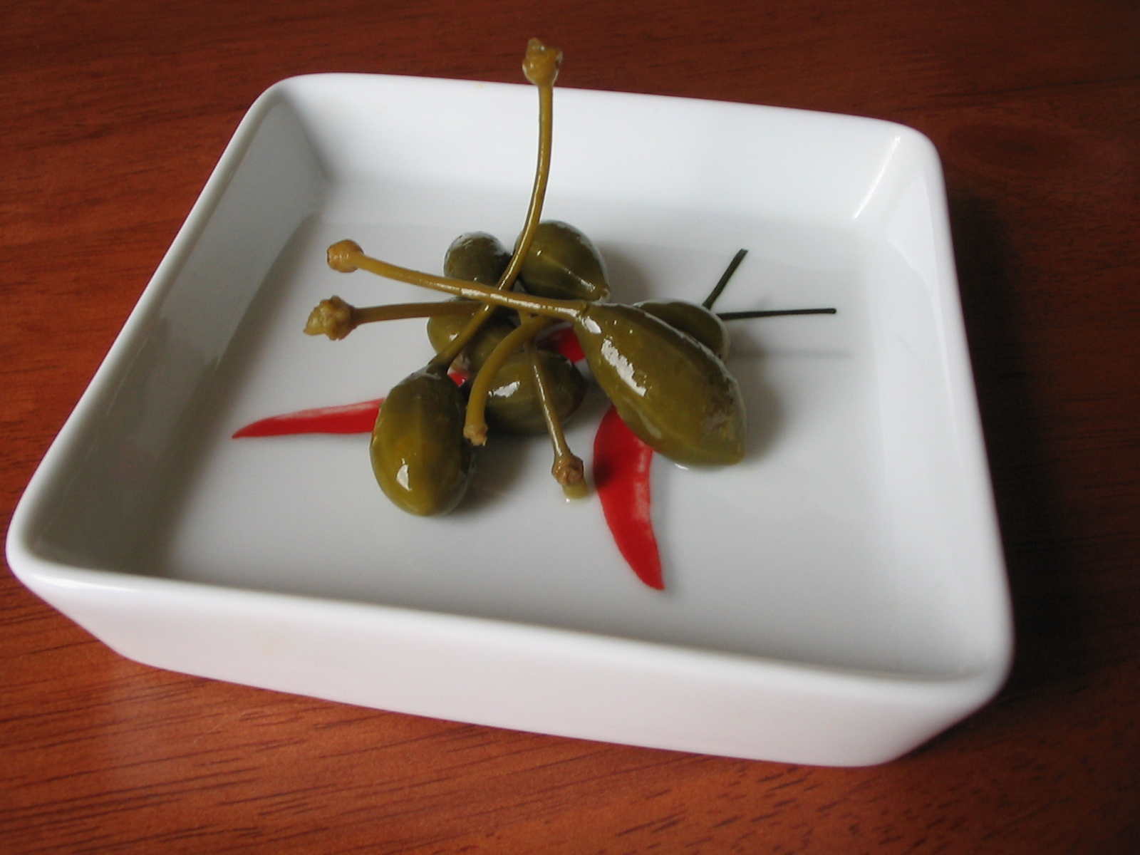 каперси мариновані у вині